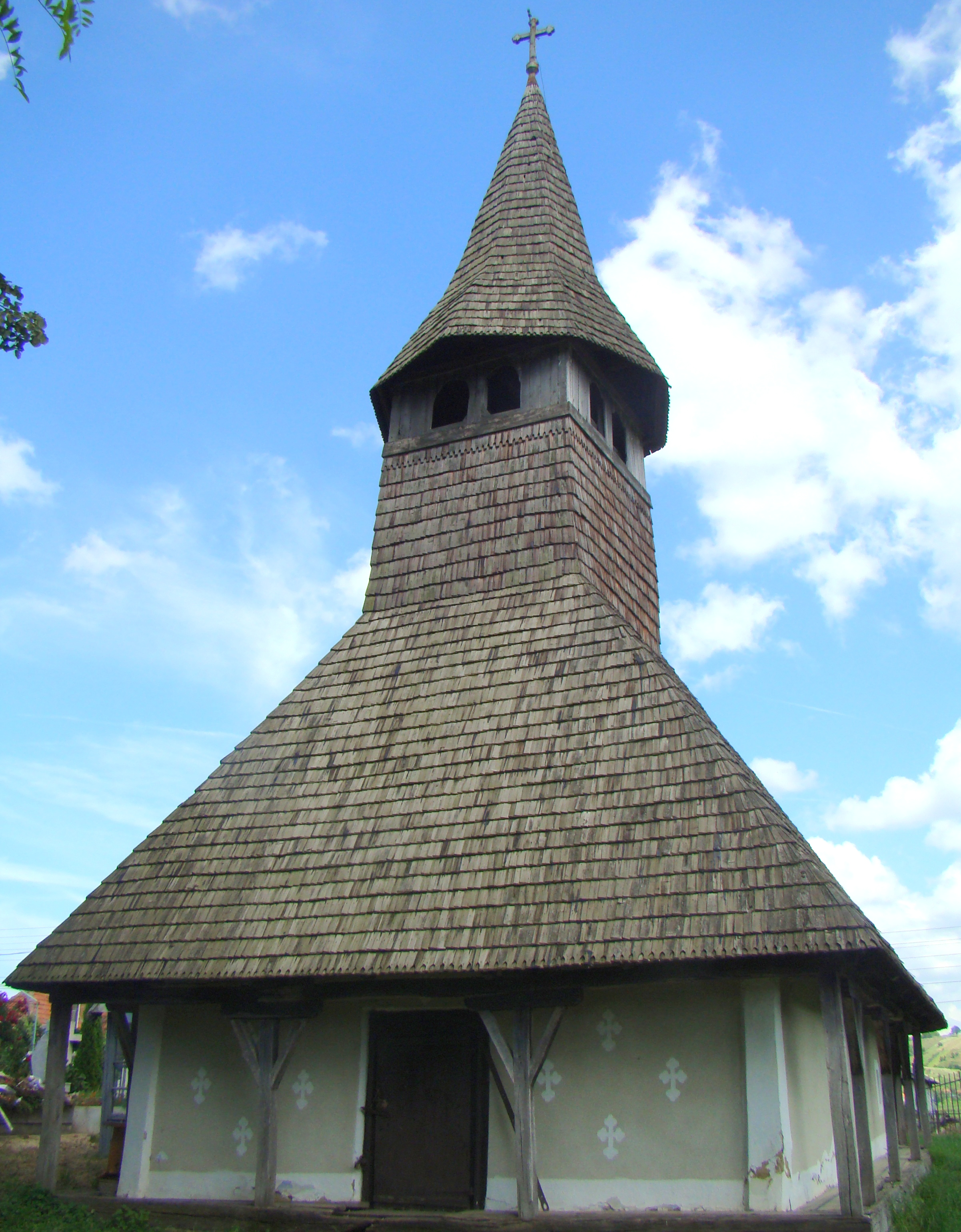 Biserica de lemn din satul Vârciorog, judeţul Bihor